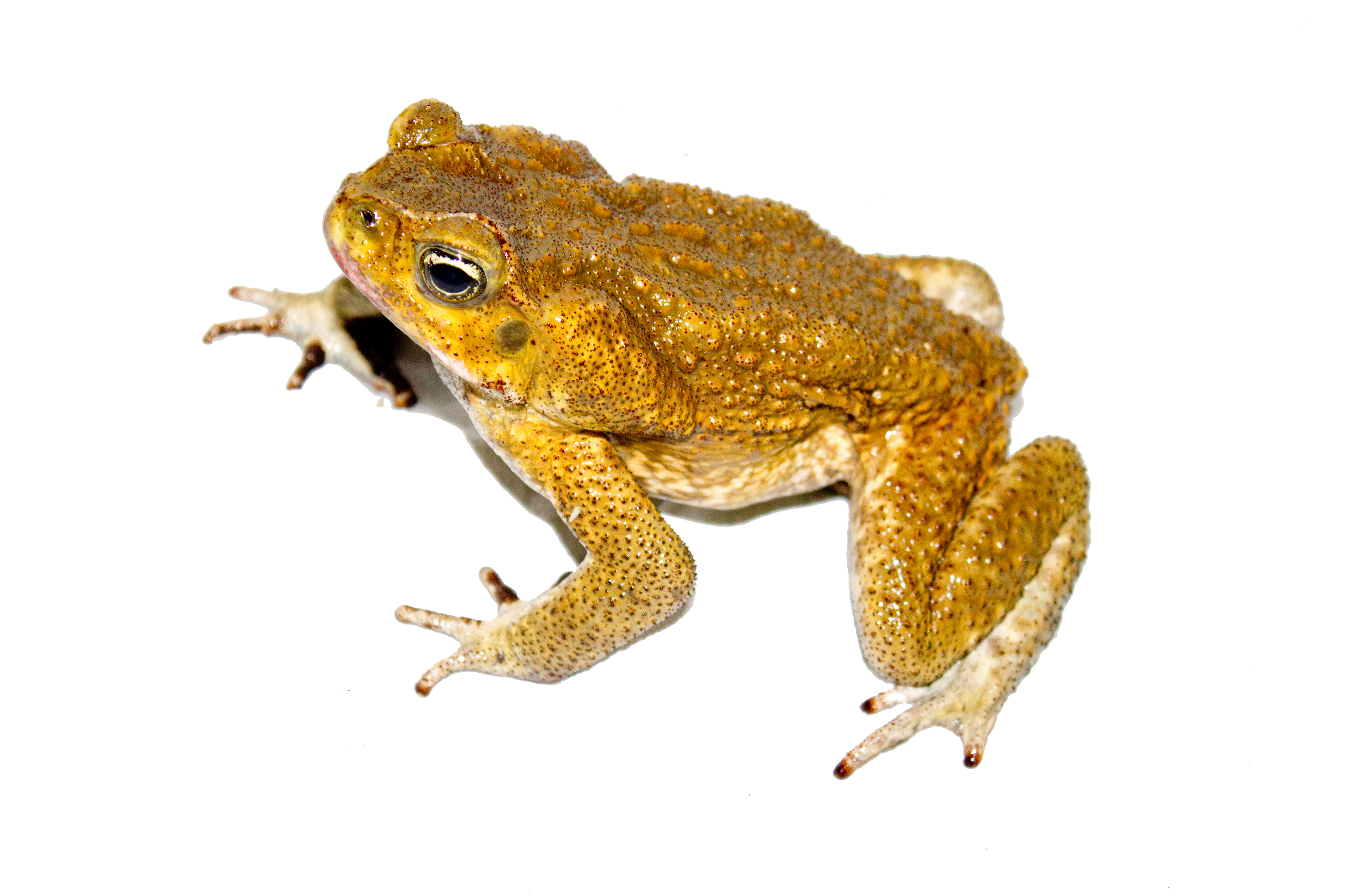 Rhinella marina (aka Bufo marinus), Panama